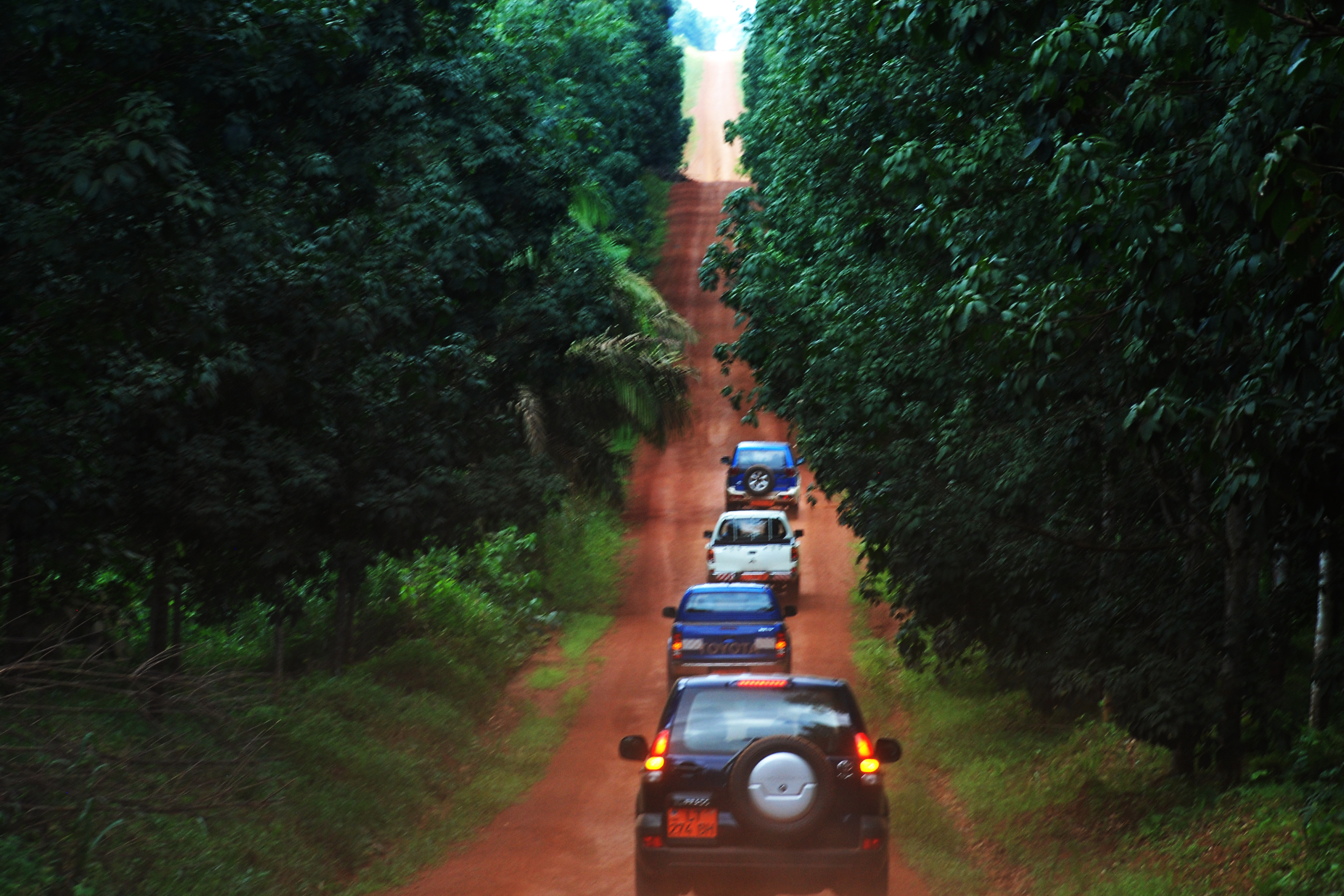 Une rue de Dizangué, vers Edéa au Cameroun.